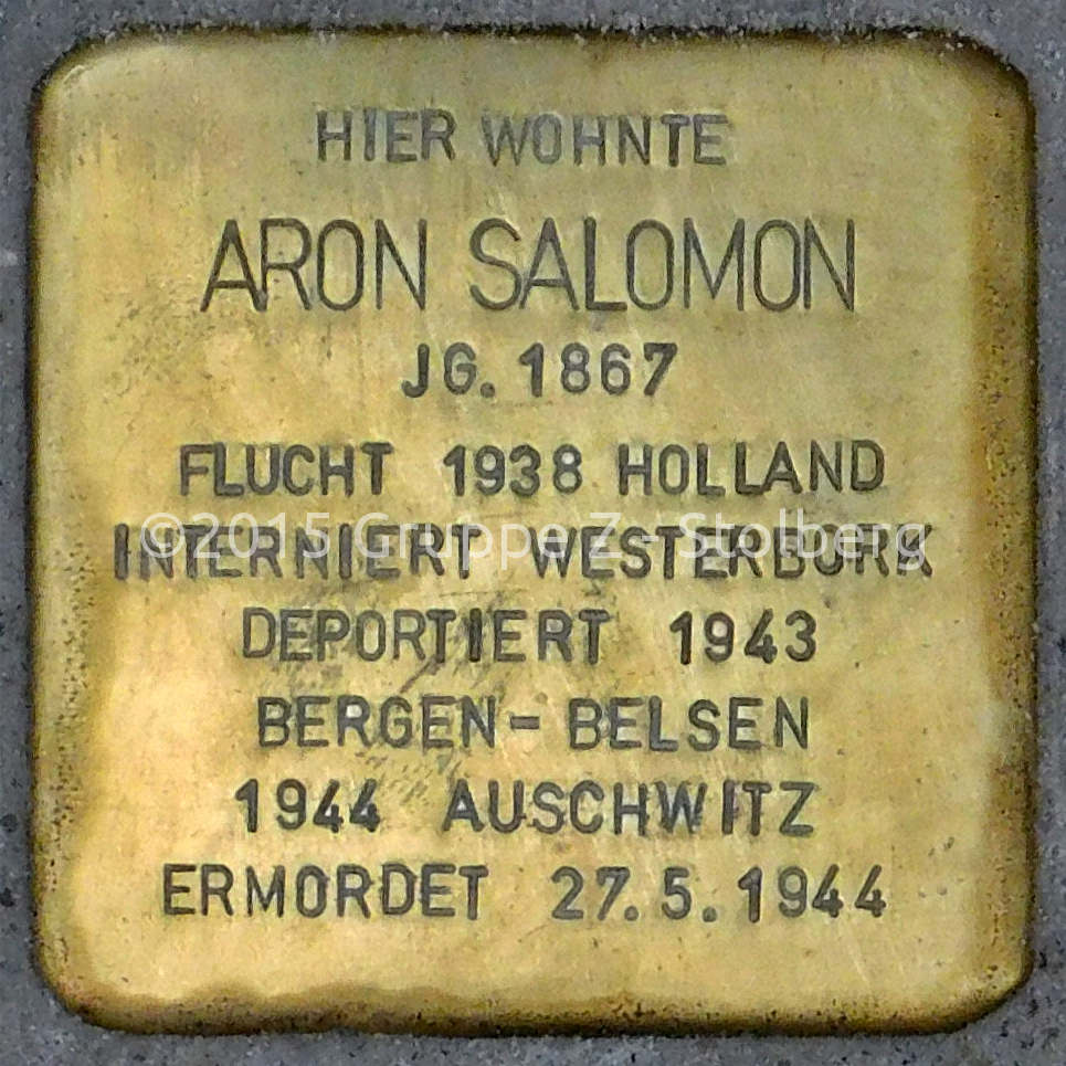 Stolperstein für Aron Salomon verlegt am 18. Dezember 2015